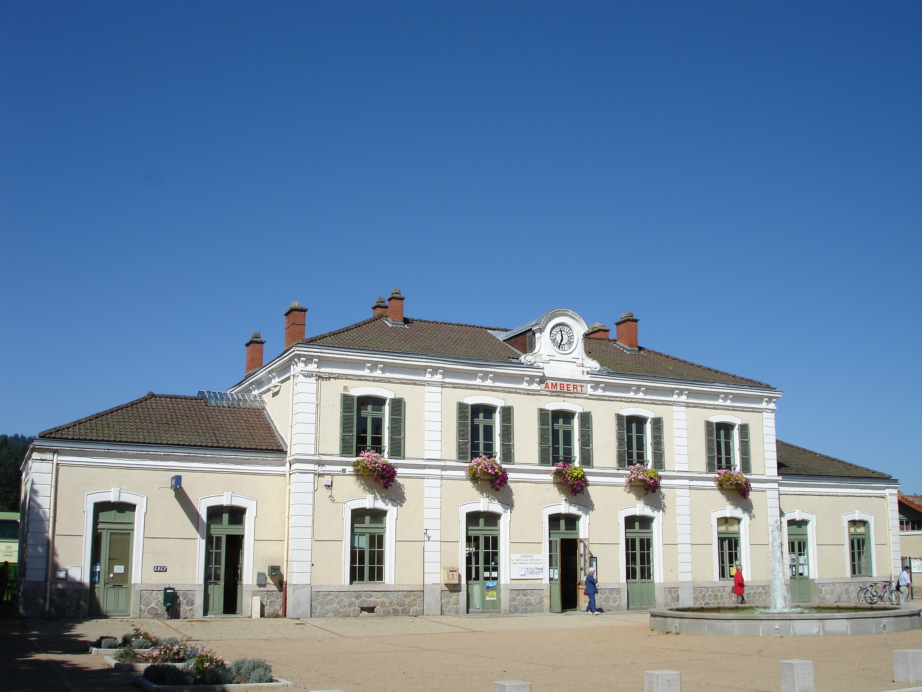 Bâtiment voyageurs de la gare d'Ambert en Auvergne.